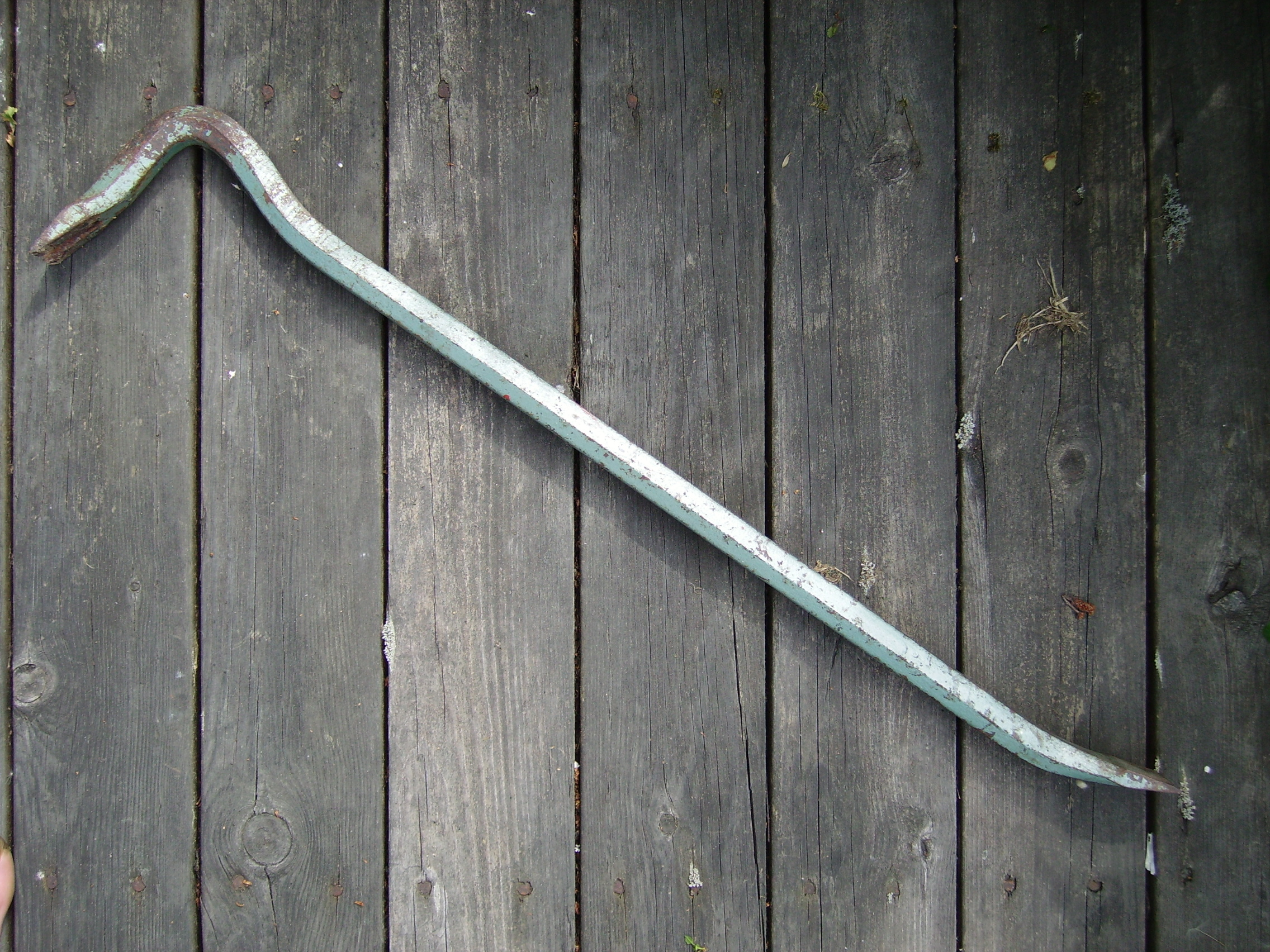 Teräksinen, kaksipäinen eli kahvaton sorkkarauta Teräksinen, kaksipäinen eli kahvaton sorkkarauta